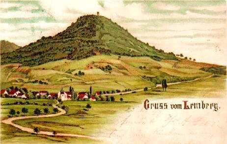 Alte Ansichtskarte vom Lemberg, Schwäbische Alb